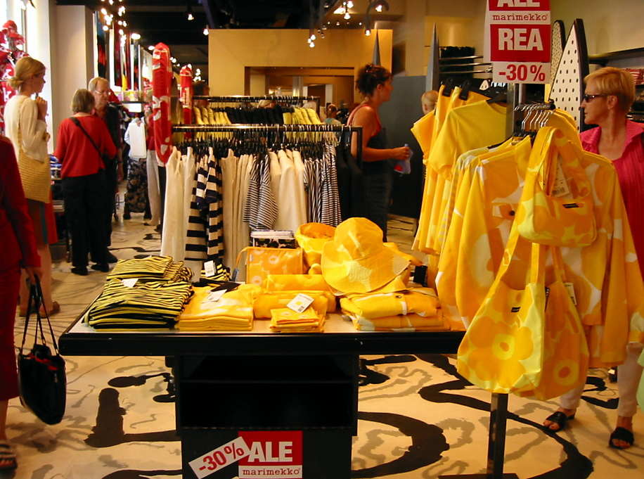 Kuva Marimekon Esplanadin liikkeen sisältä.